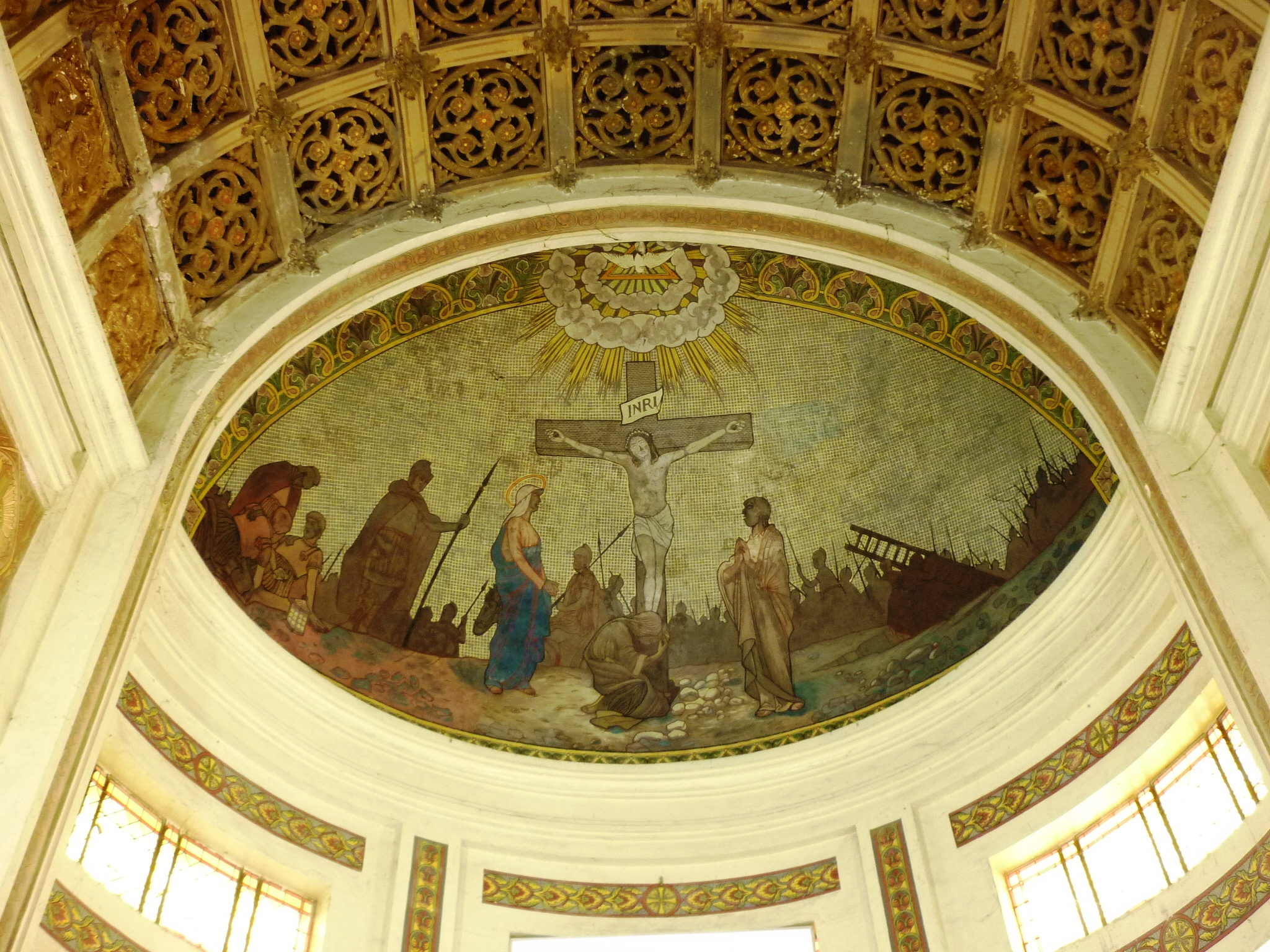 Vòm nhà thờ có khung bông vuông đúc theo hình vòng cung, khắc họa cảnh đồi Calvario